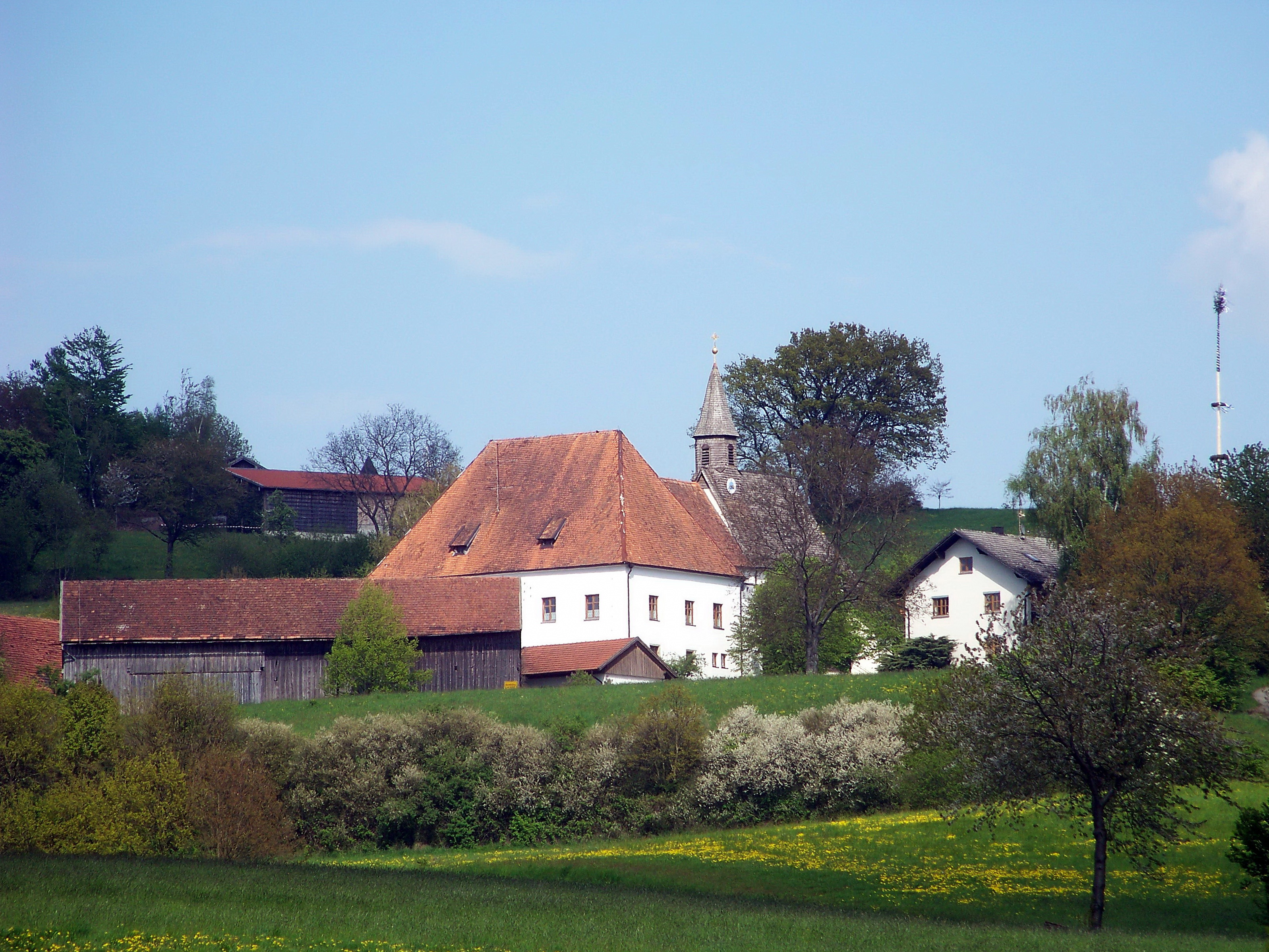 Schloss Herrnfehlburg. Der ehemalige Edelsitz besteht aus dem Schloss und der östlich angebauten Kapelle St. Thomas.